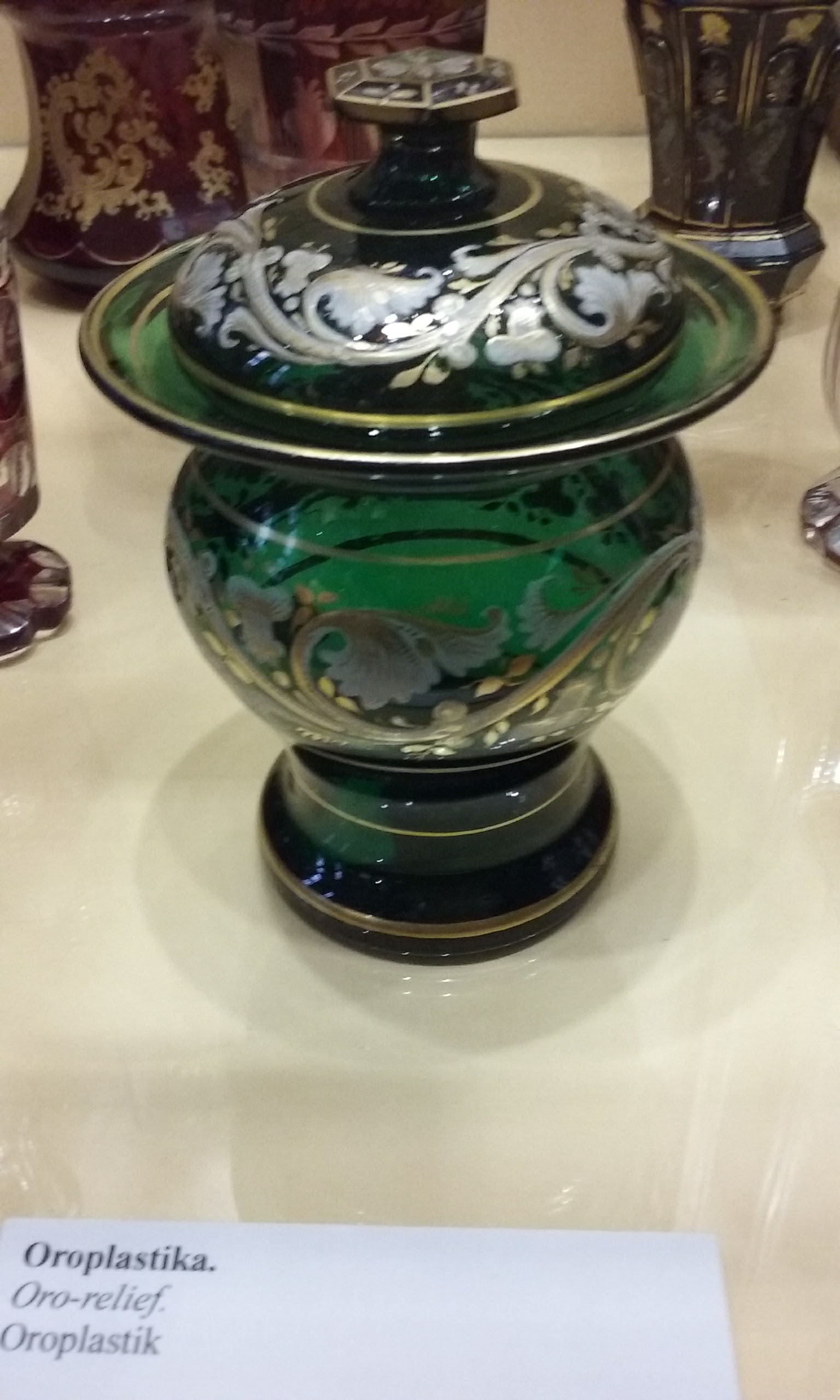 Historické sklo v muzeu v Sušici. Okres Klatovy, Česká republika.